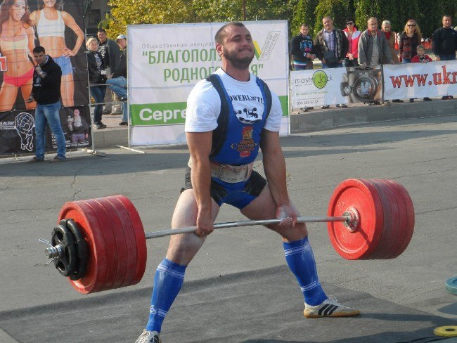 Соревнование в Мелитополе